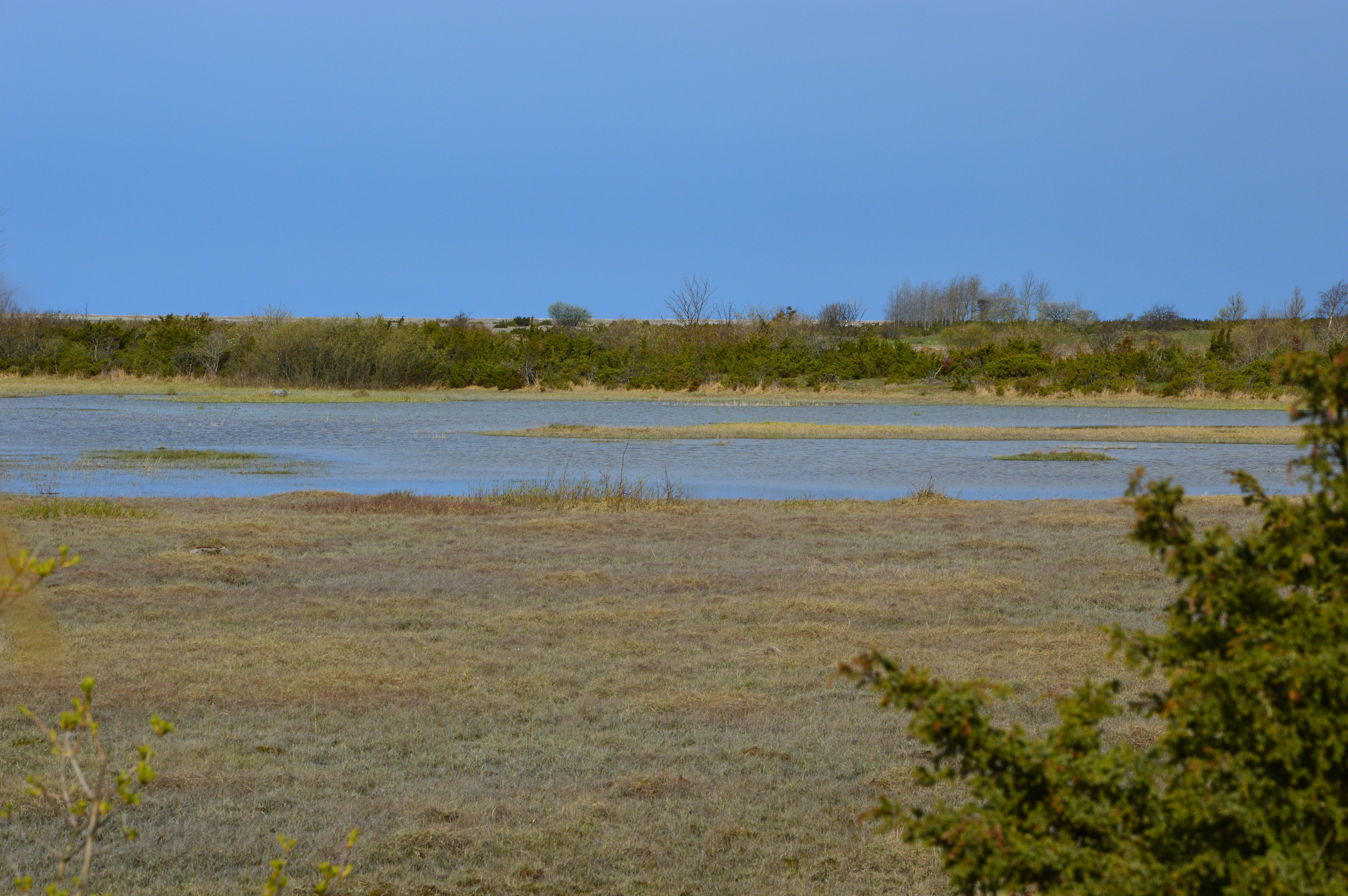 Krokatstaindappen